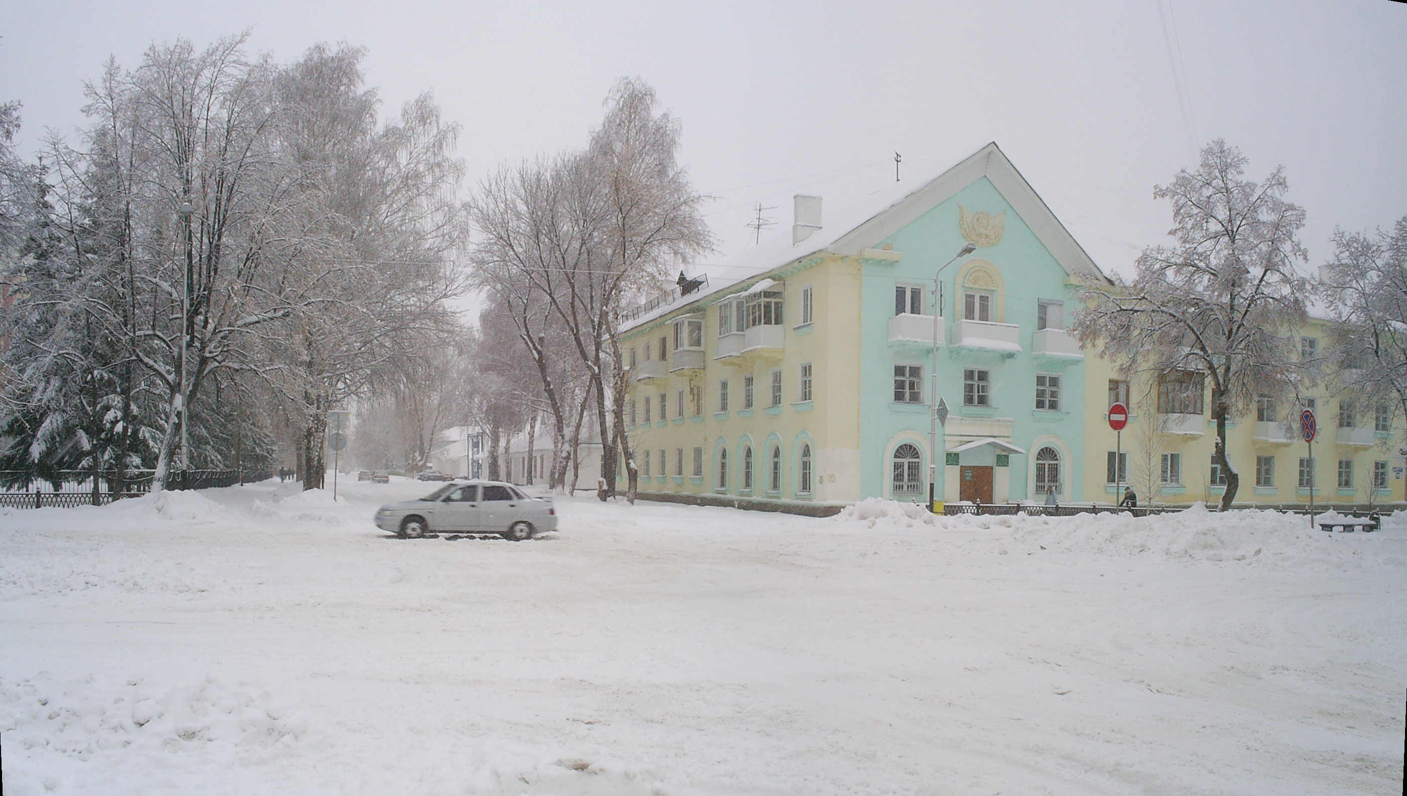 Ишимбайский историко-краеведческий музей. Фото с пересечения проспекта Ленина и улицы Гагарина